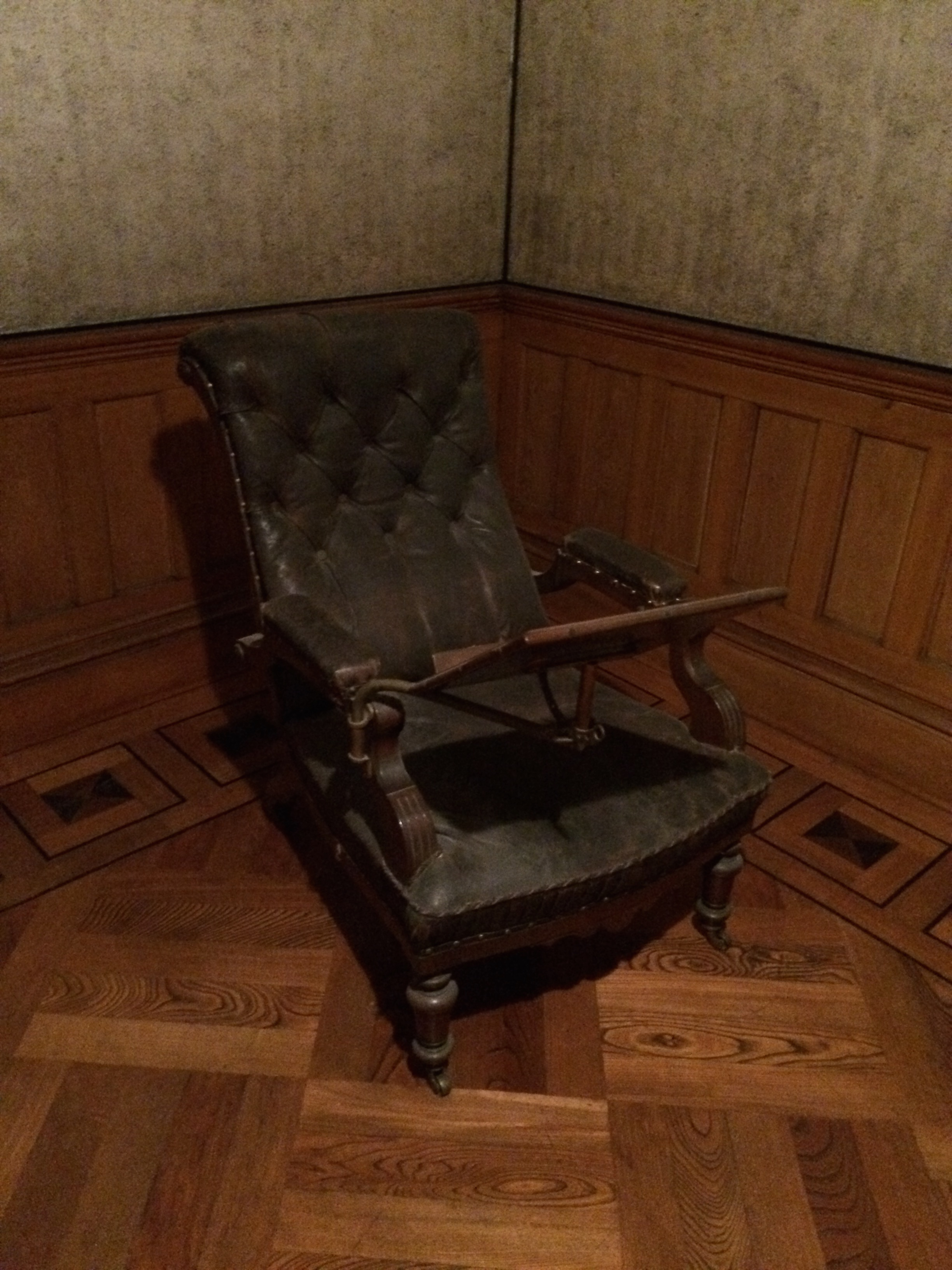 山県有朋愛用の書見台付きのいす。無鄰庵洋館２階に展示されている